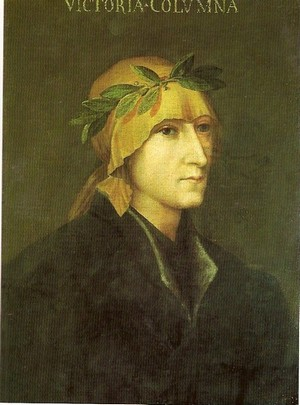 Anonymous, Vittoria Colonna